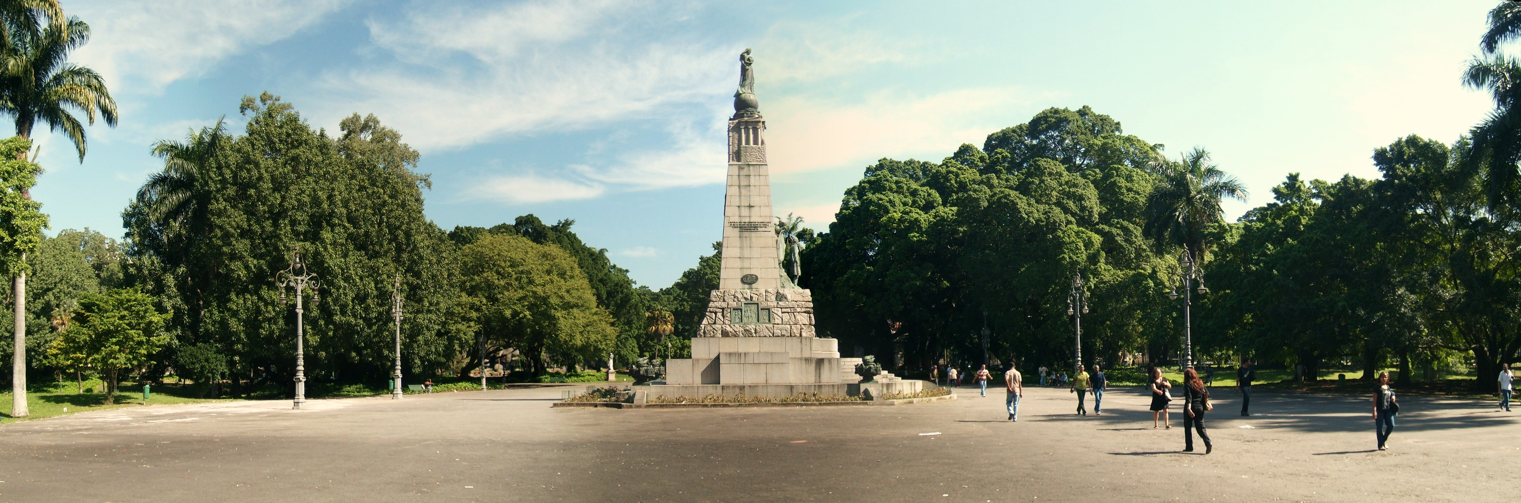 Campo de Santana (ou Praça da República), no Centro do Rio de Janeiro, em 180º.